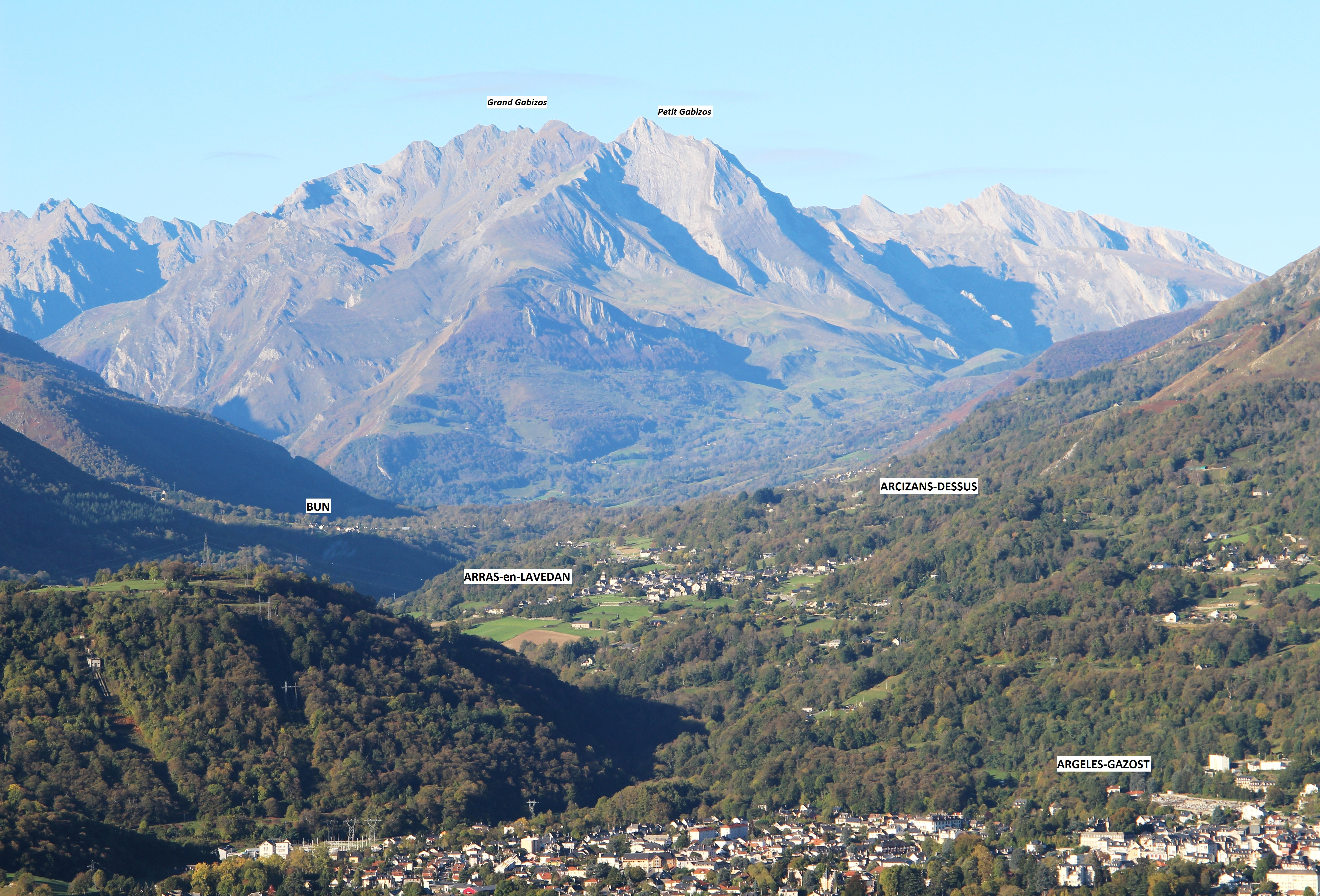 Val d'Azun